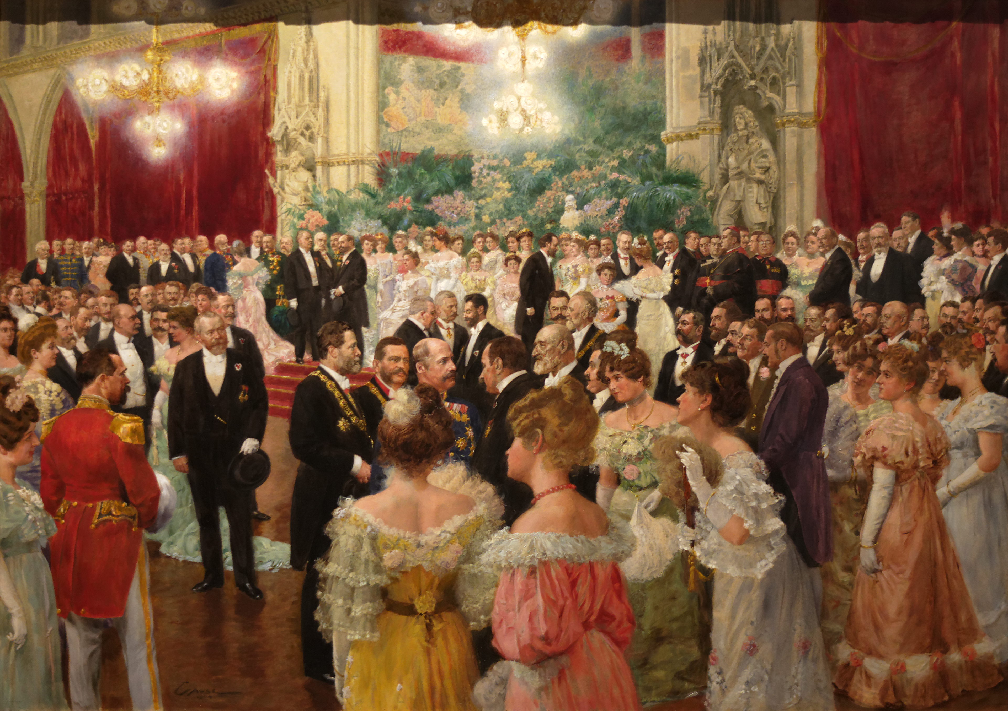 Bal à l'hôtel de ville de Vienne (Autriche) en présence du maire, Karl Lueger. Wilhelm Gause, 1904. Exposé au musée d'histoire de Vienne